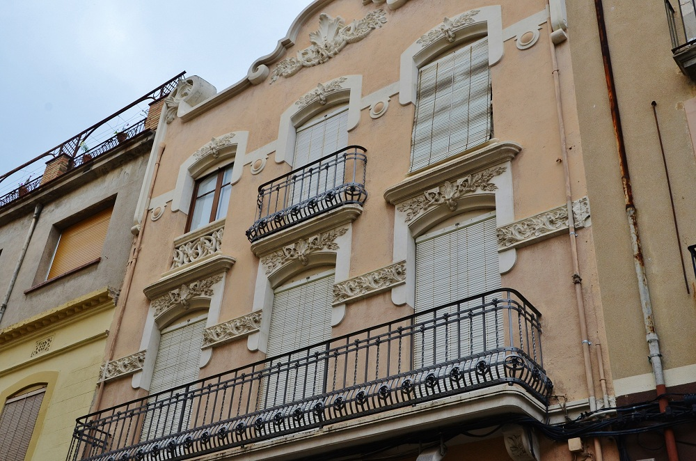 Casa Maria Raurell (Vilafranca del Penedès)